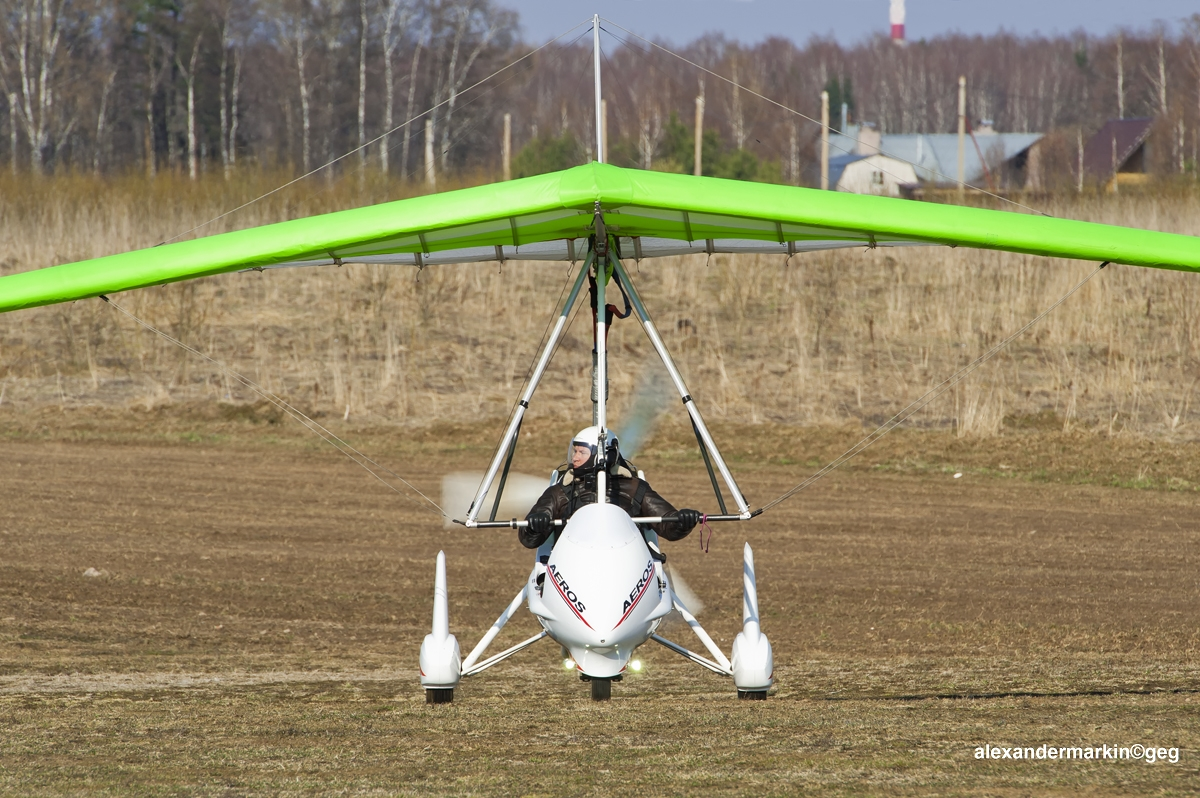 Aeros-2